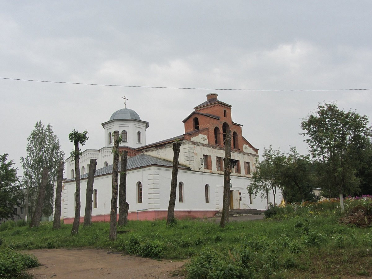 Руба. Царква лекара Панцеляймона